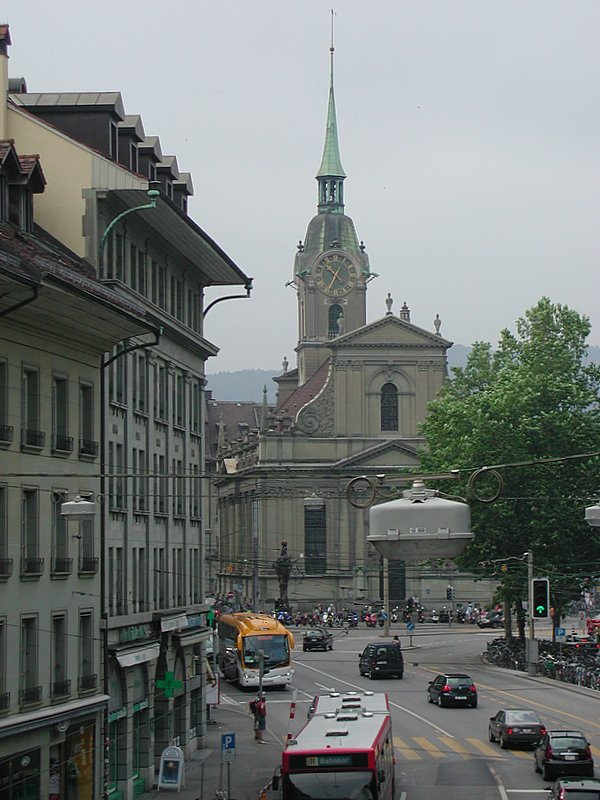 Blick von der Bollwerk-Überführung auf die Heiliggeistkirche und das untere Bollwerk Source: photo uploaded by User:RicciSpeziari. Photographer: Riccardo Speziari